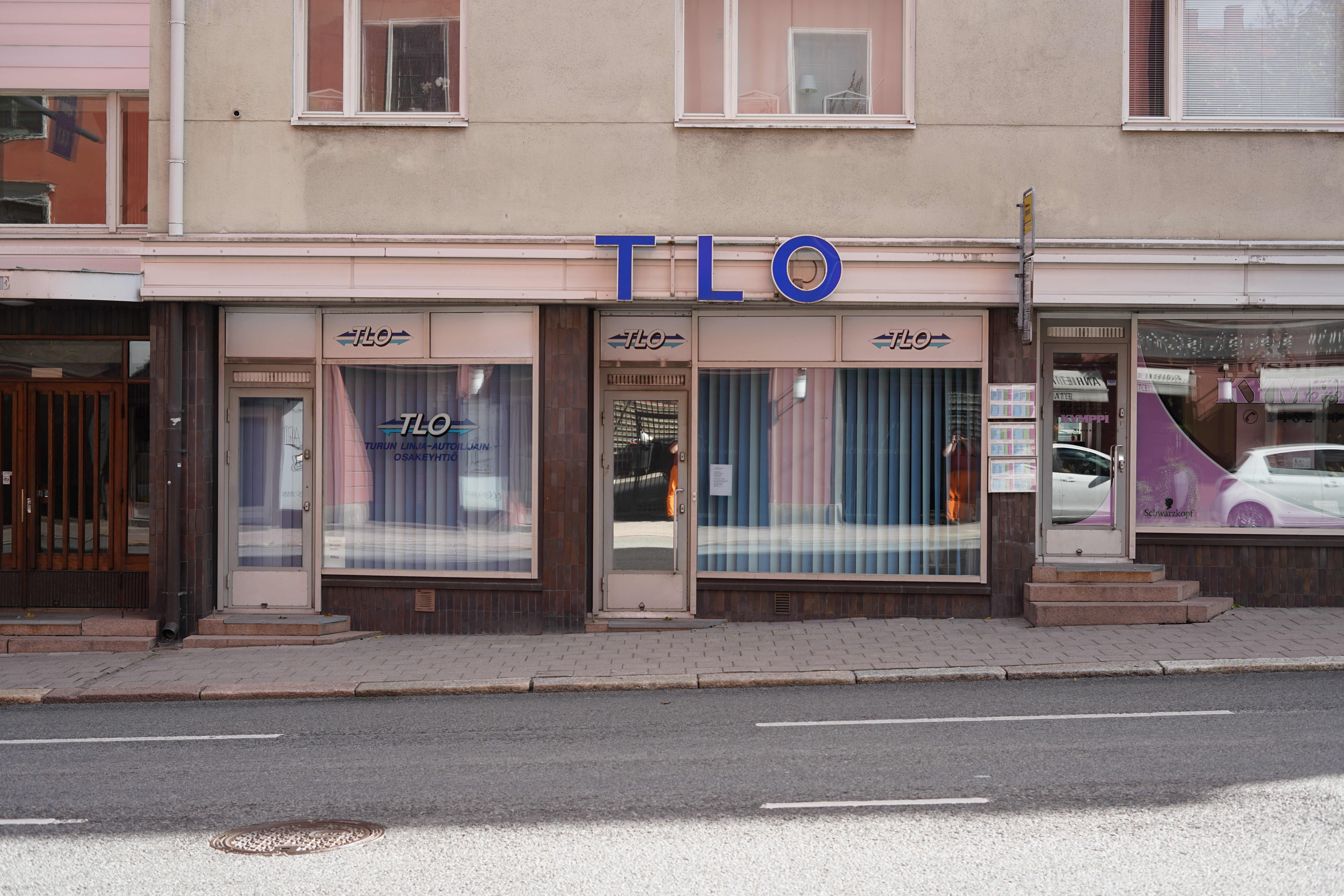 Turun Linja-autoilijain Osakeyhtiön toimisto